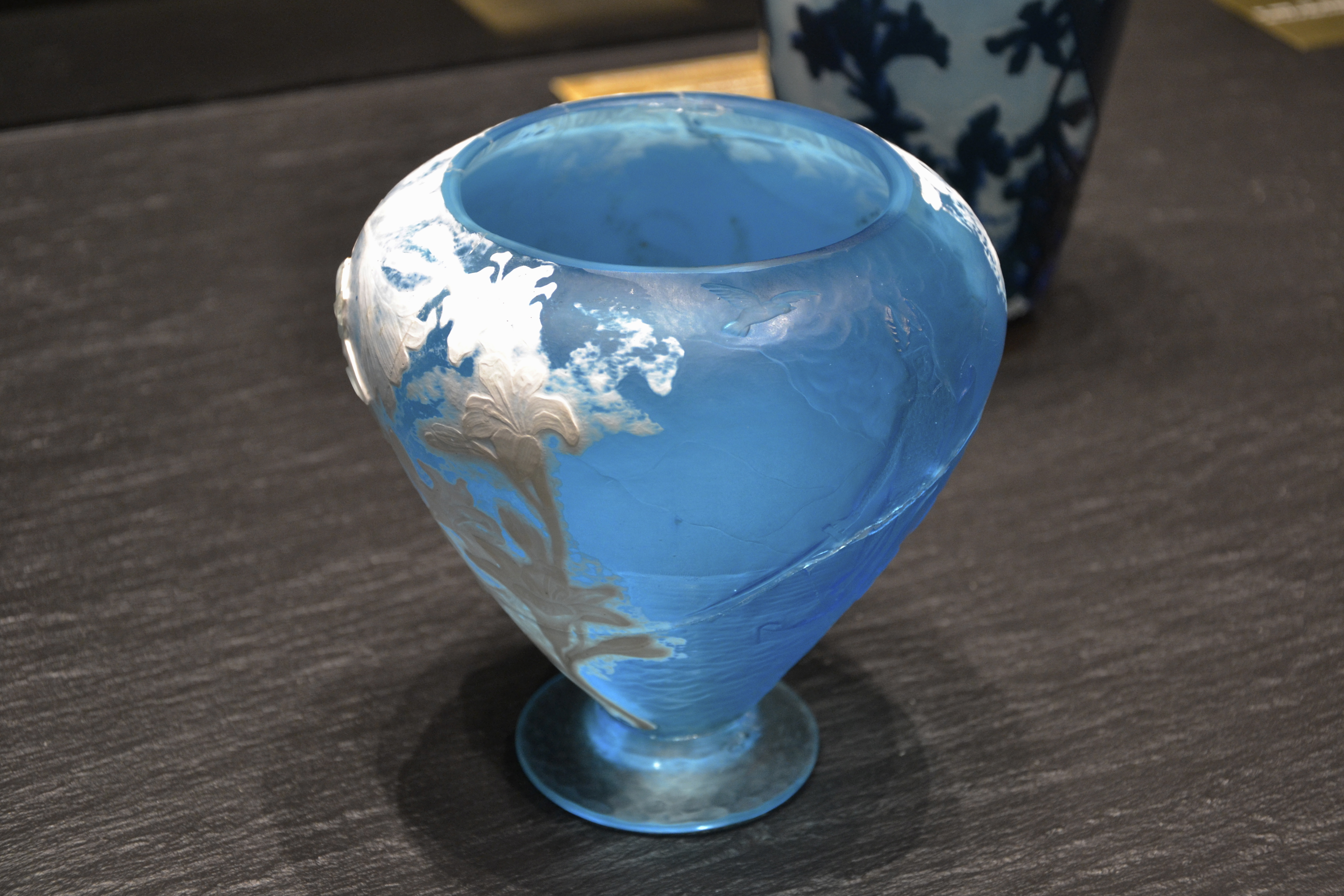 1894 En collaboration avec Jacques Gruber Verre soufflé-moulé, multicouche, gravé à l’acide et à la roue. Pied en application.